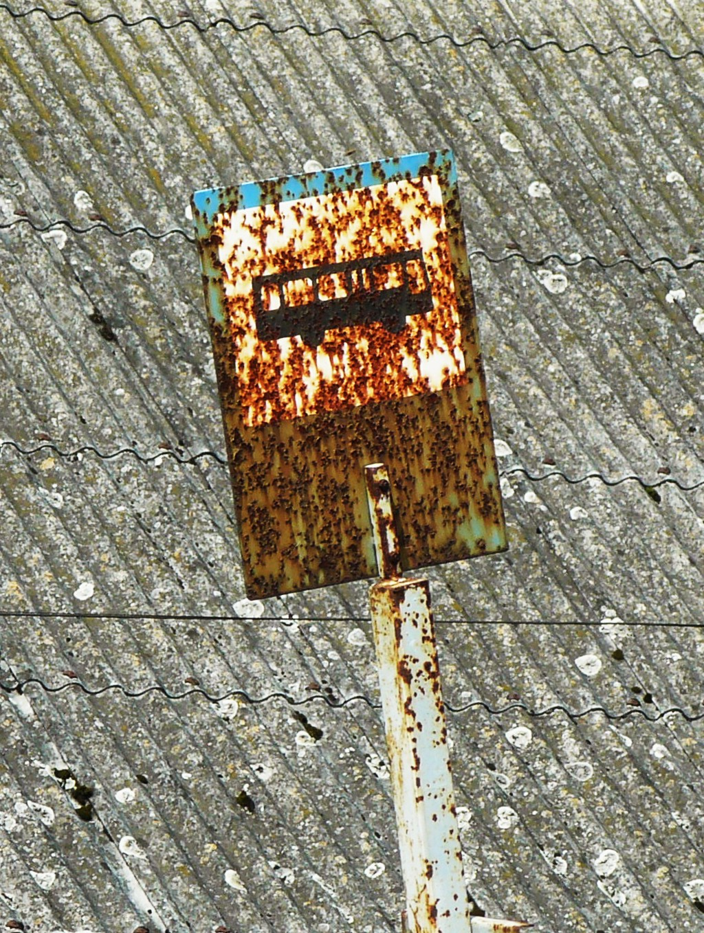 Bobowo na Pomorzu (Kociewiu).